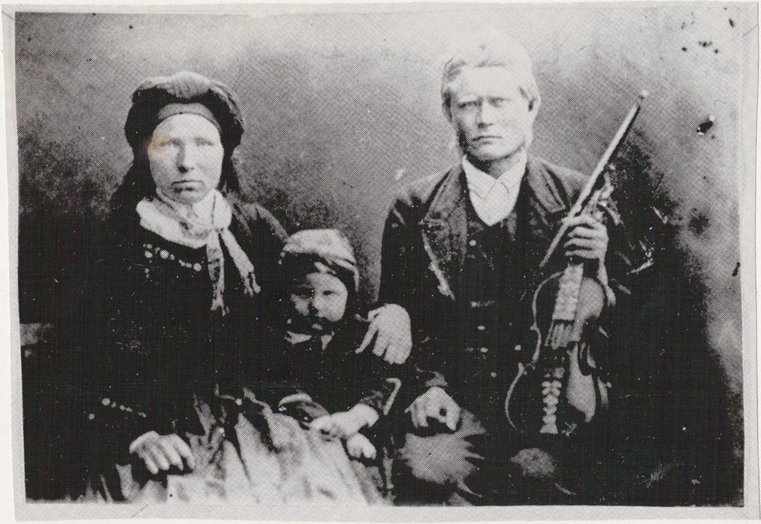 Olav Tjønnstaul med familei